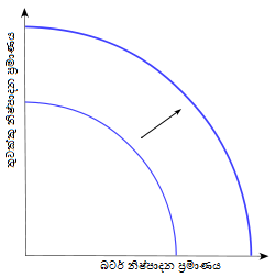 සිංහල: නි.හැ.මා වක්‍රයේ විස්තාරණය